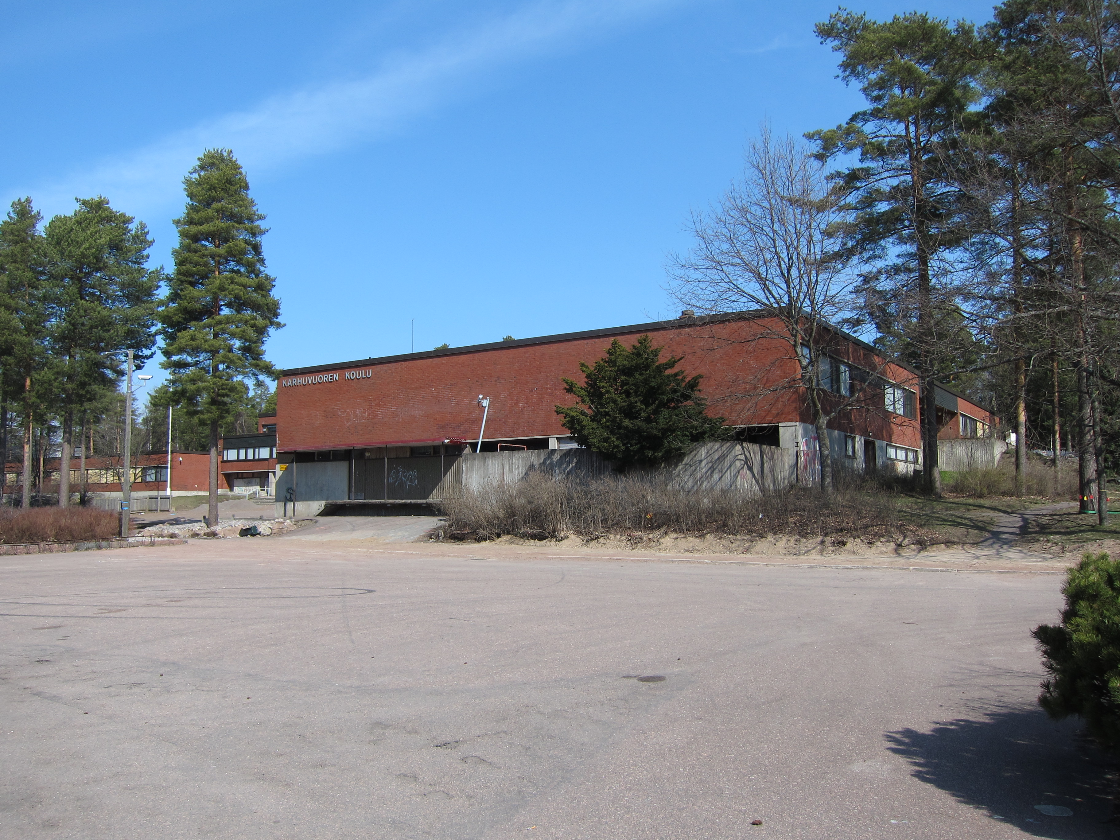 Karhuvuoren vuonna 2014 purettu vanha koulurakennus Kotkassa.